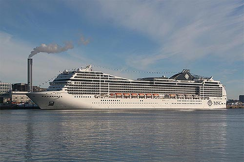 MSC Magnifica in Hamburg